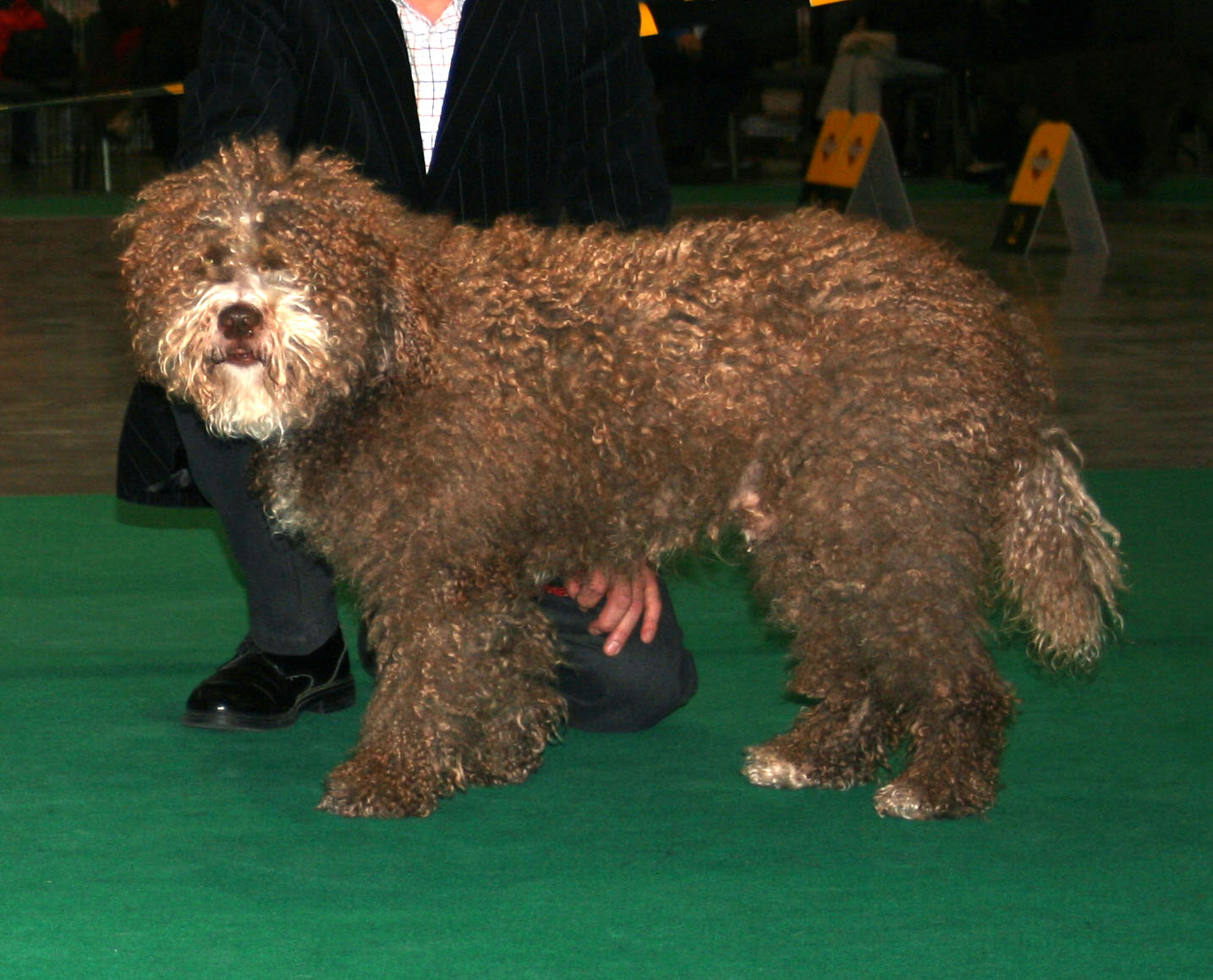 Hiszpański_pies_wodny na Światowej Wystawie Psów Rasowych w Poznaniu